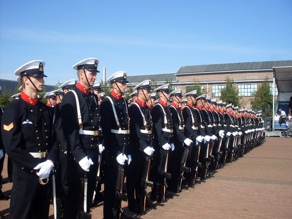 Adelborsten Gewapende exersitie tijdens de installatie september 2009